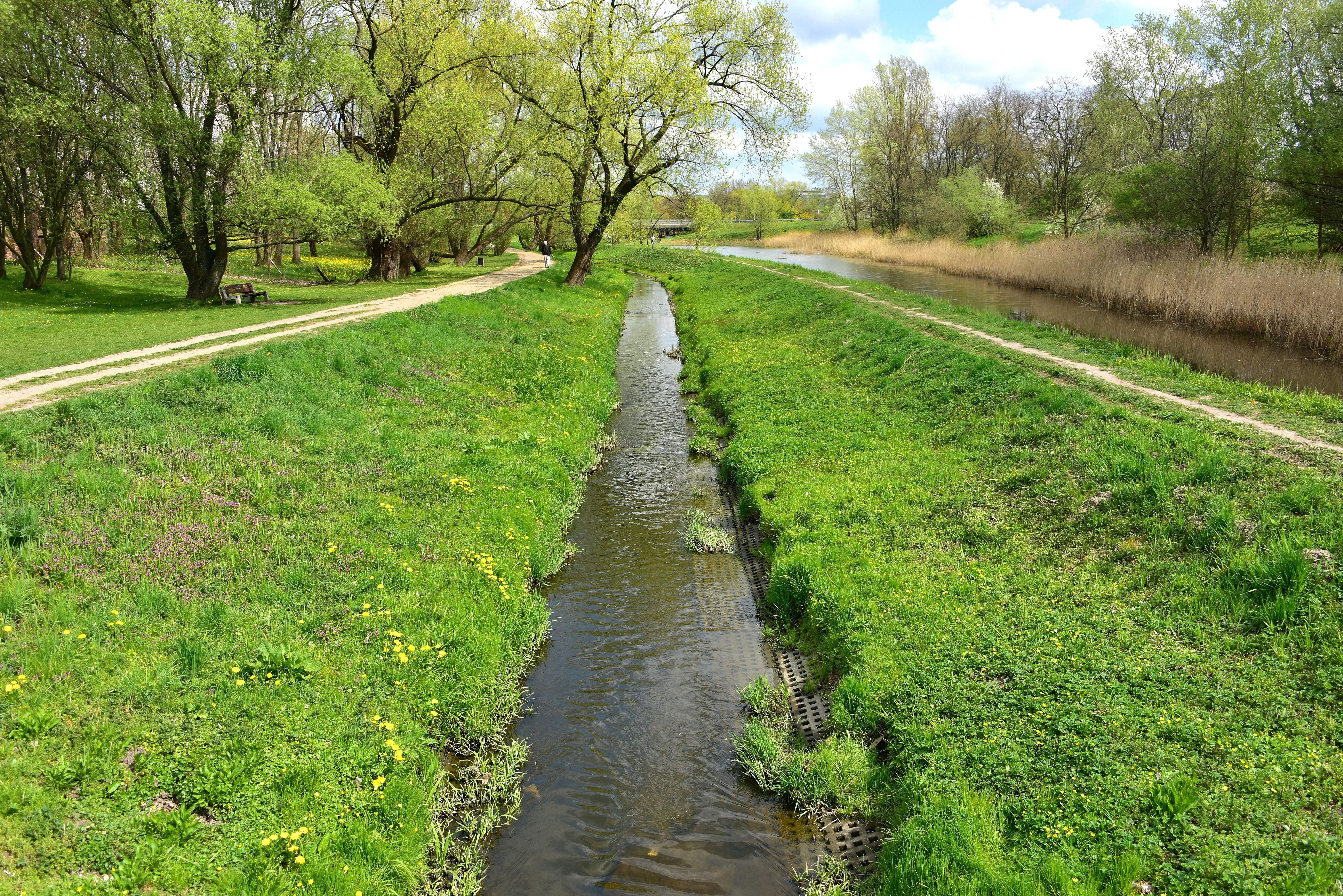 Potok Służewiecki w parku Dolinka Służewska